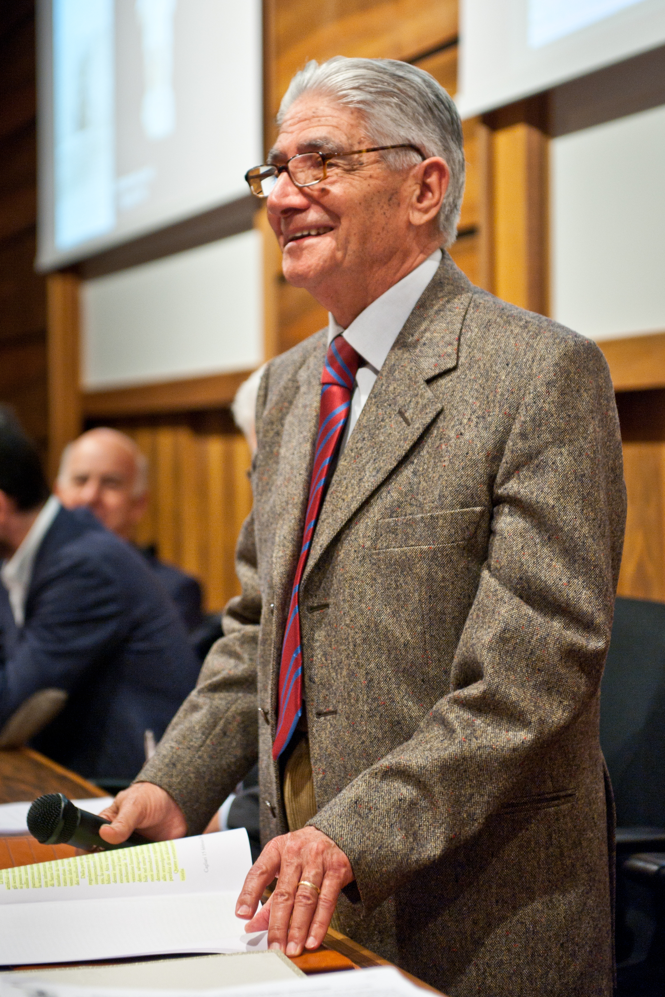 Professore Enrico Atzeni alla Conferenza Tuvixeddu in onore di Giovanni Lilliu